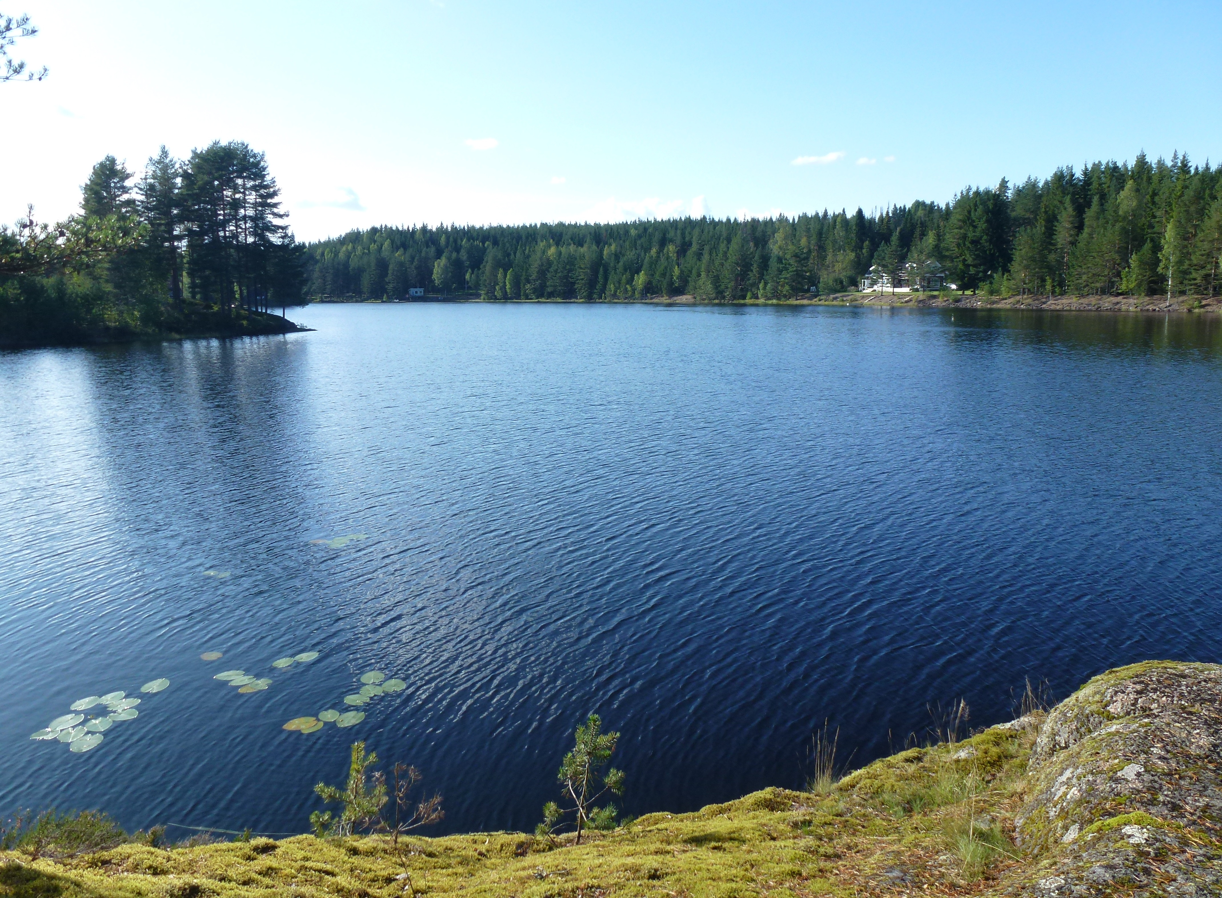 Stora Malingen